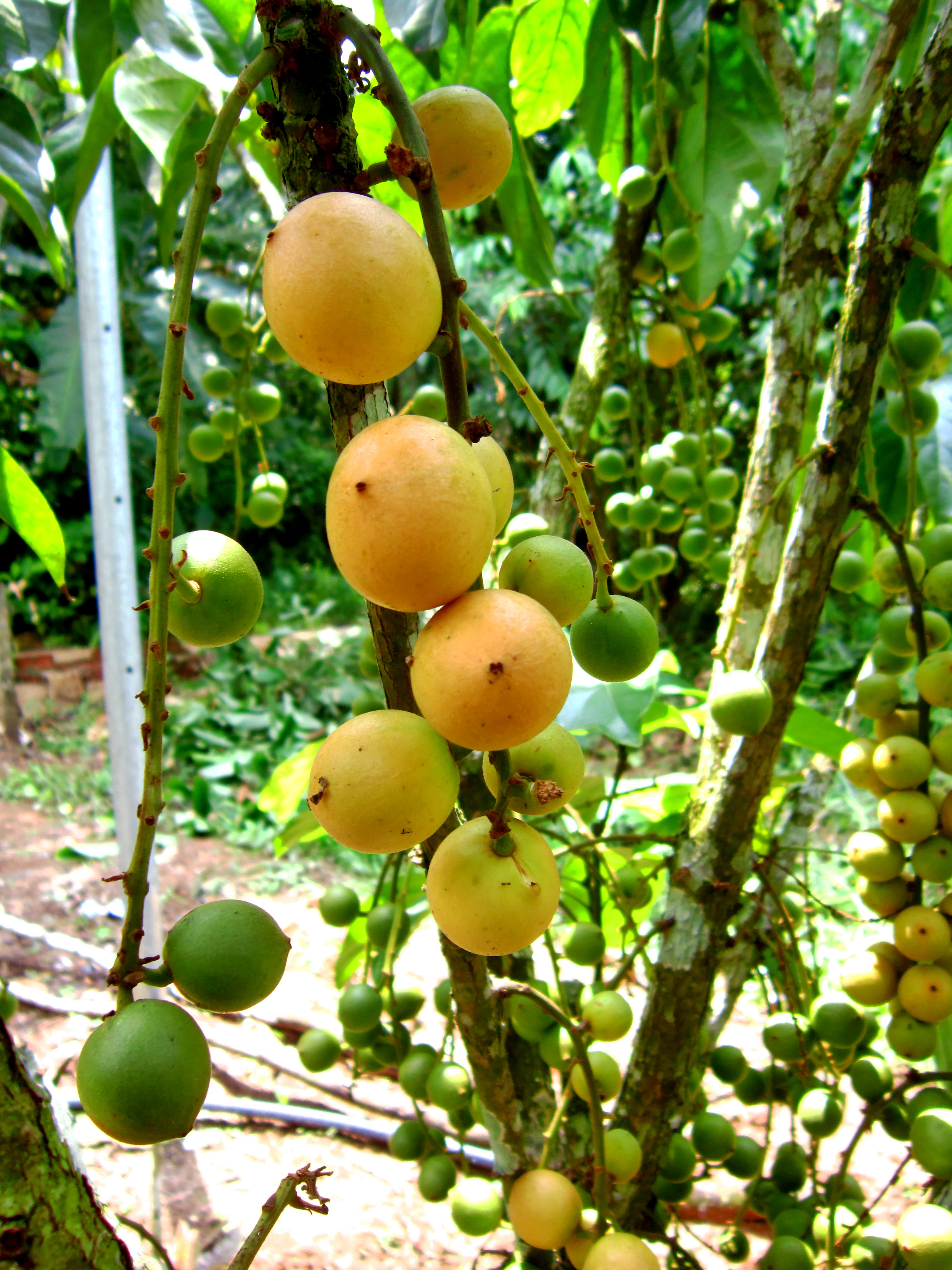 Một loài dâu da (danh pháp khoa học: Baccaurea) thường được trồng để lấy quả ở miền Nam Việt Nam.